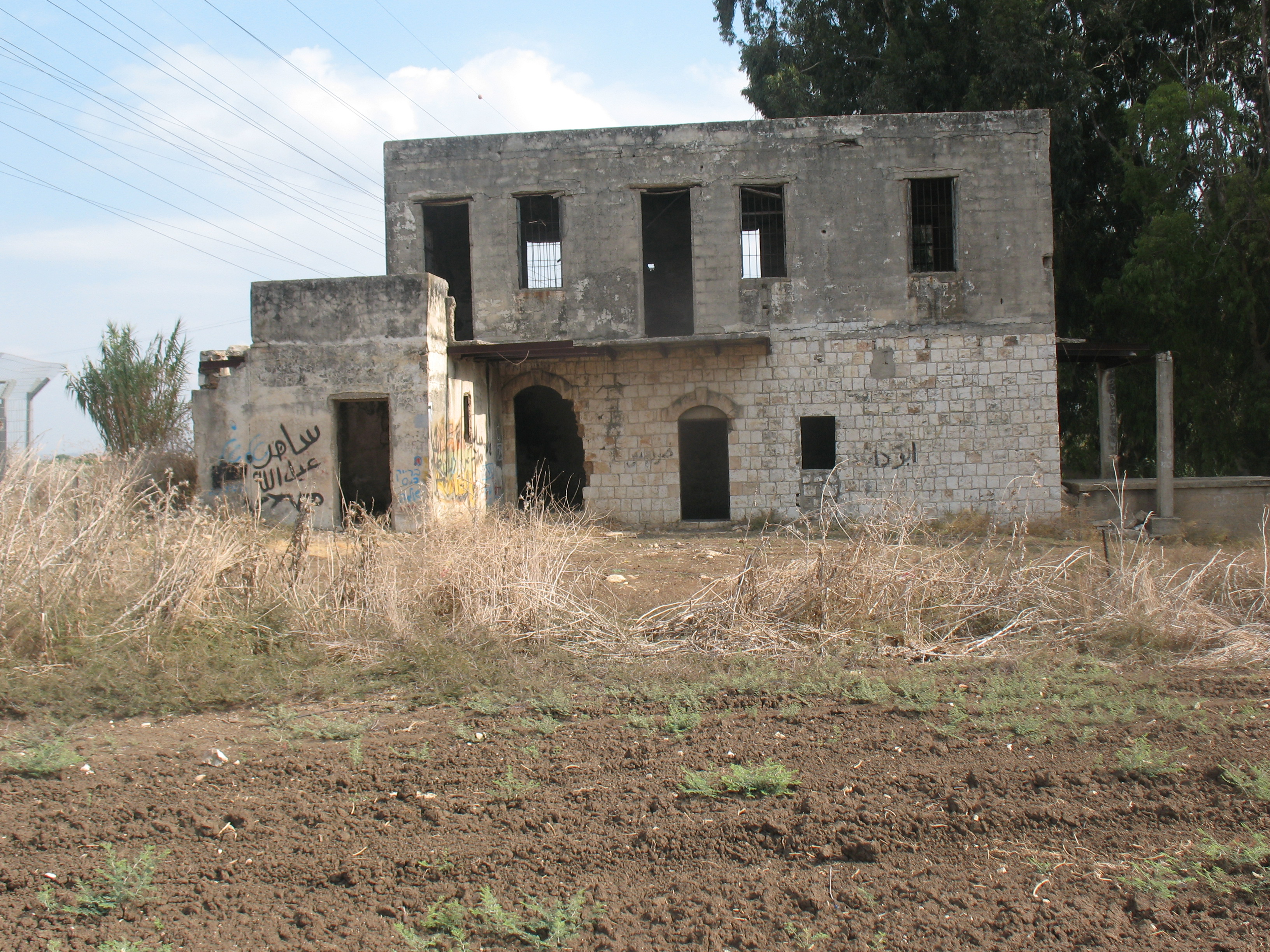 הצד המערבי של בית הפרדס בית לאה . צילום אלי אלון